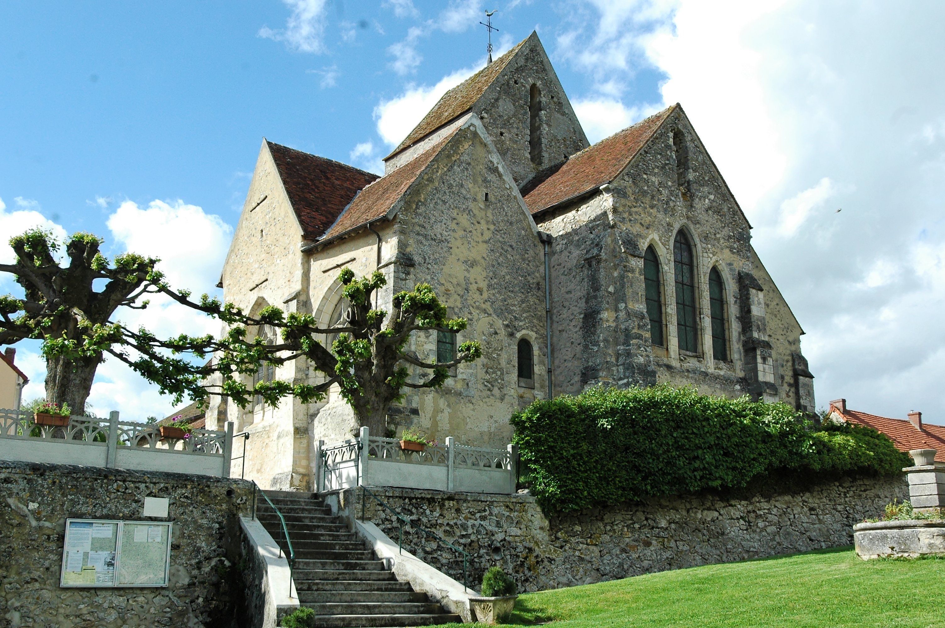 Église de Baulne-en-Brie.